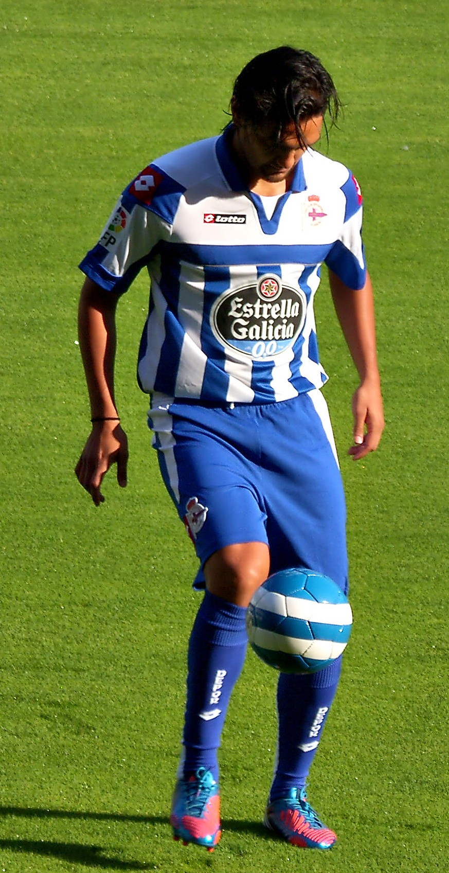 Presentació del jugador del Depor, cedit per l'Hèrcules, Abel Aguilar